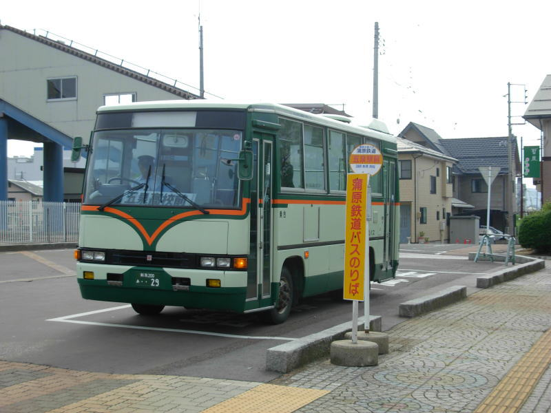 蒲鉄小型バス・路線バス車両（五泉駅前）